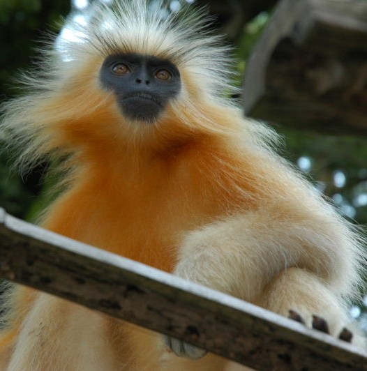 A Golden Langur in Guwahati, Assam.